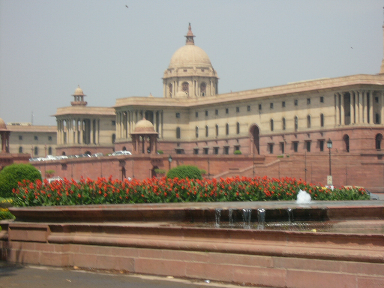 Indian Parliament Building Delhi India